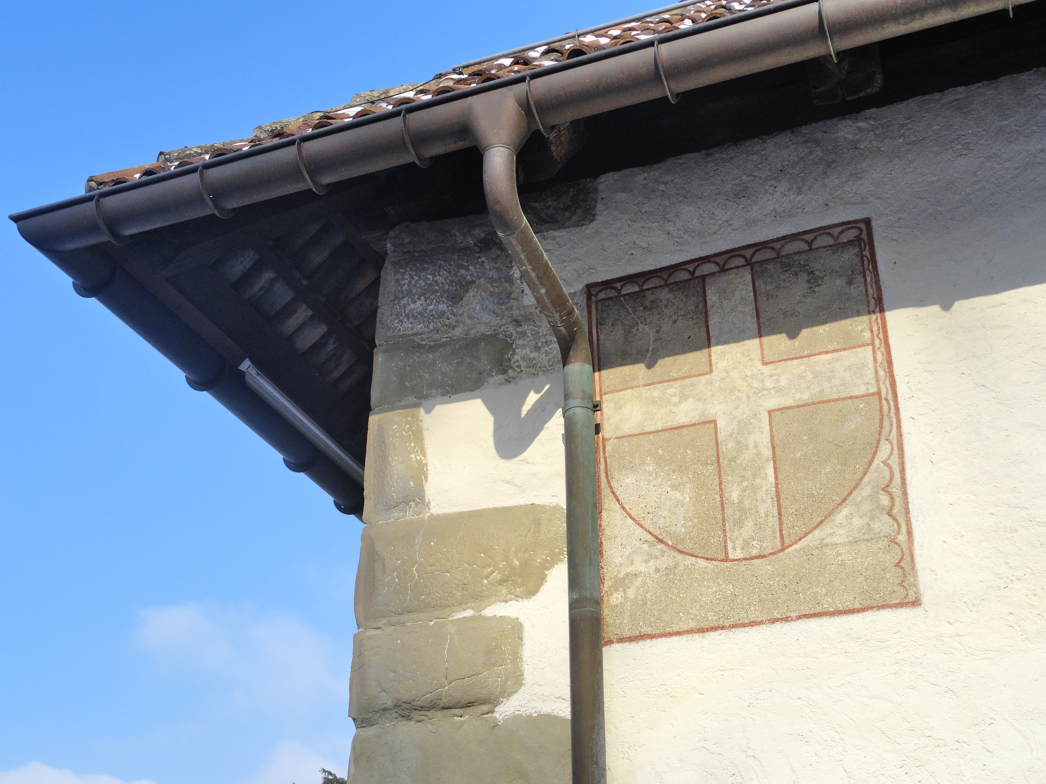 Zehnentrotte Wappen Johanniter an der Südseite